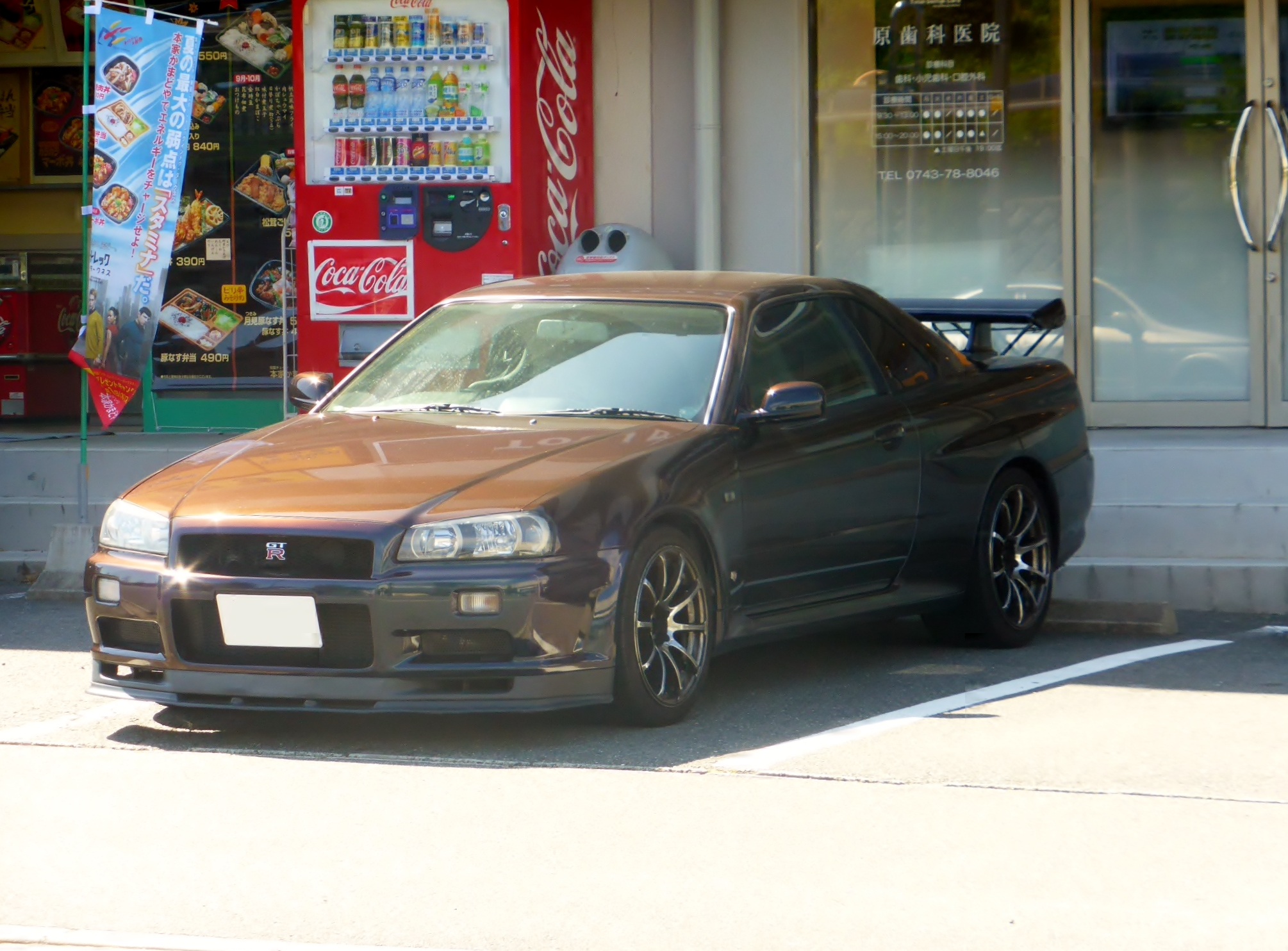 BNR34型日産・スカイラインGT-R Vスペックをフロントから撮影。